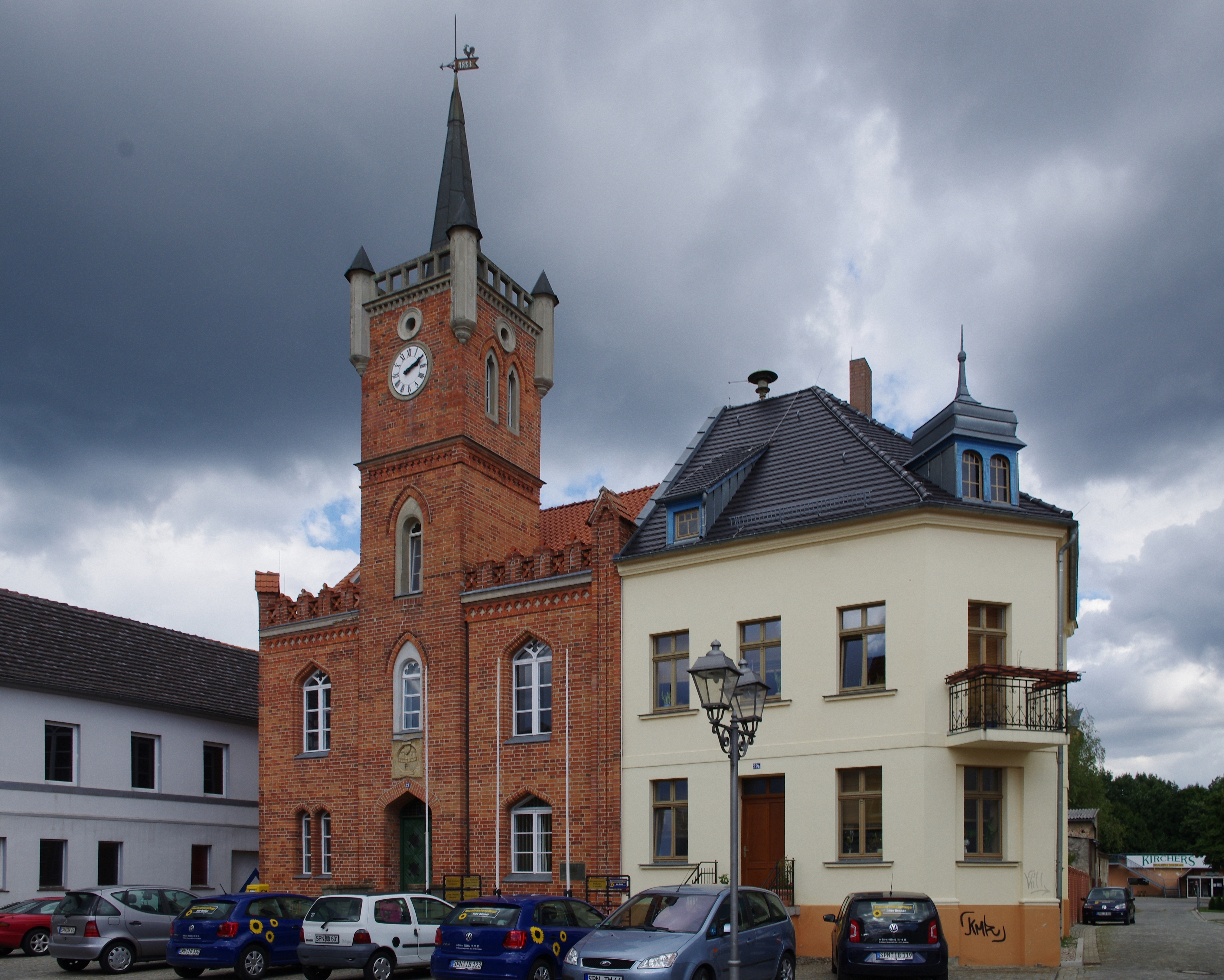 Drebkau in Brandenburg. Das Haus in der Straße Drebkauer Straße 29 steht unter Denkmalschutz. Das linke Gebäude ist das Rathaus.